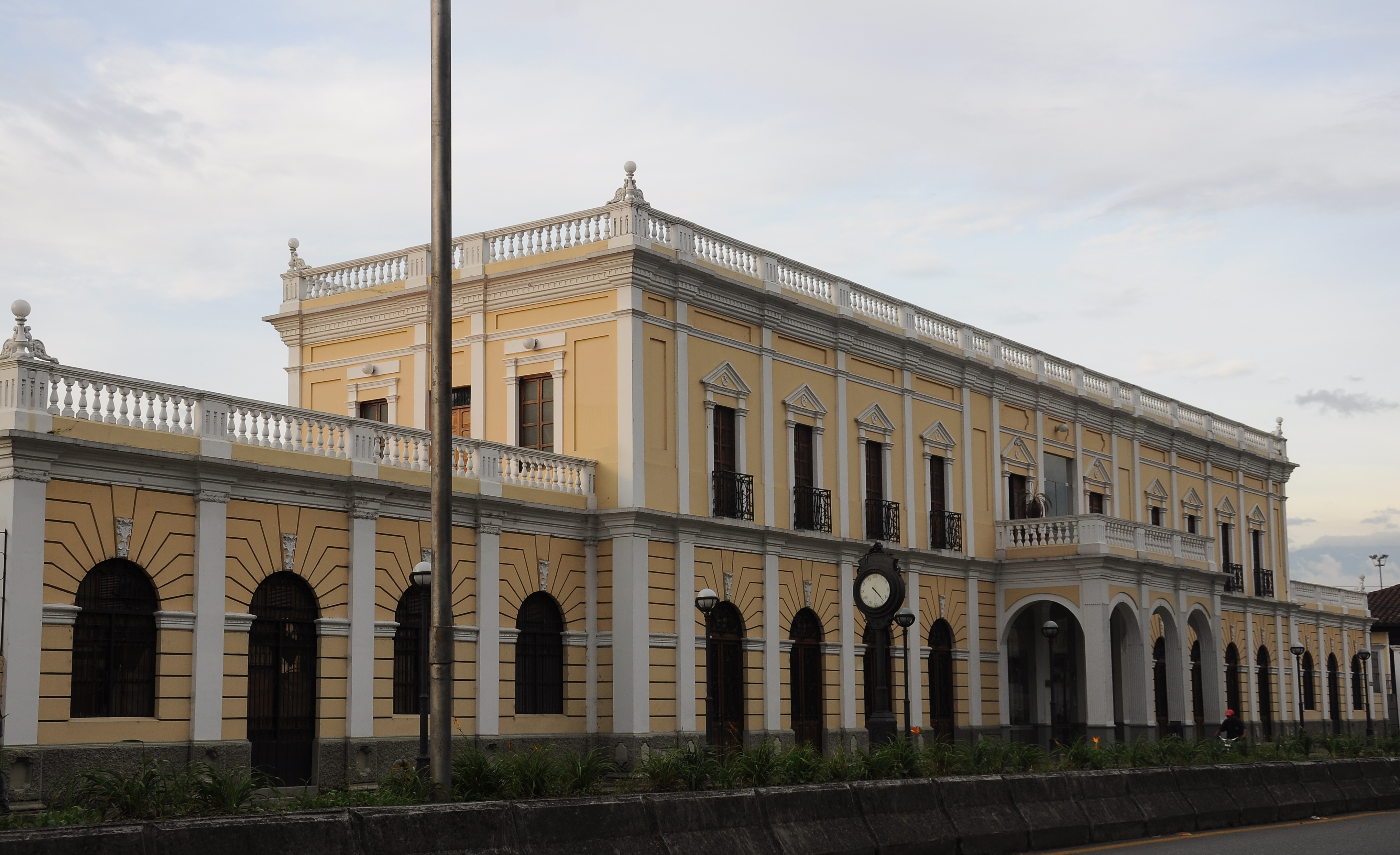 Carrera 18 y 19, Calle 26